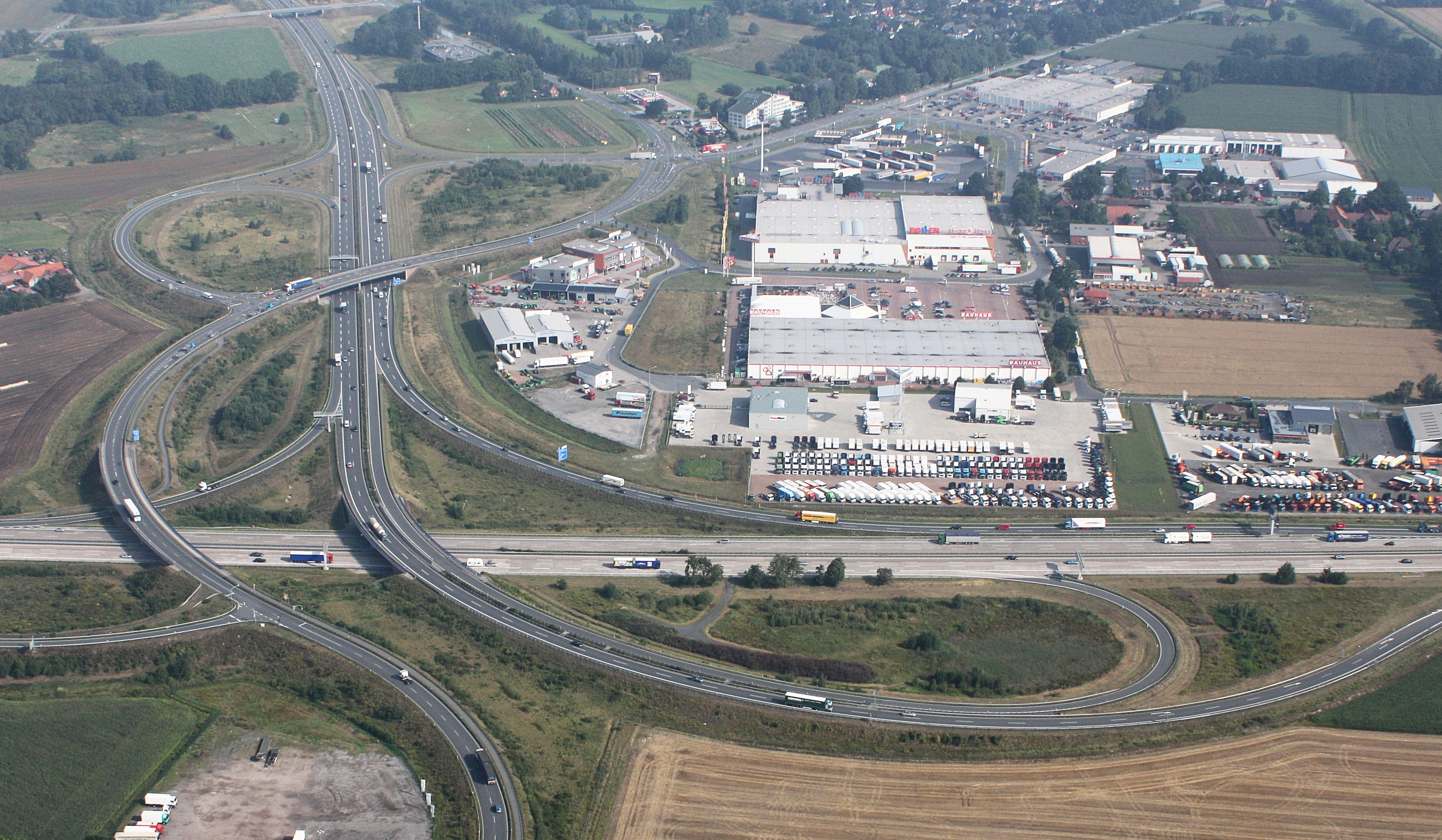 Luftaufnahme; entlang der A1 (auf der Südseite) vom Dreieck Stuhr in Richtung Osten, bis zur Abfahrt Brinkum